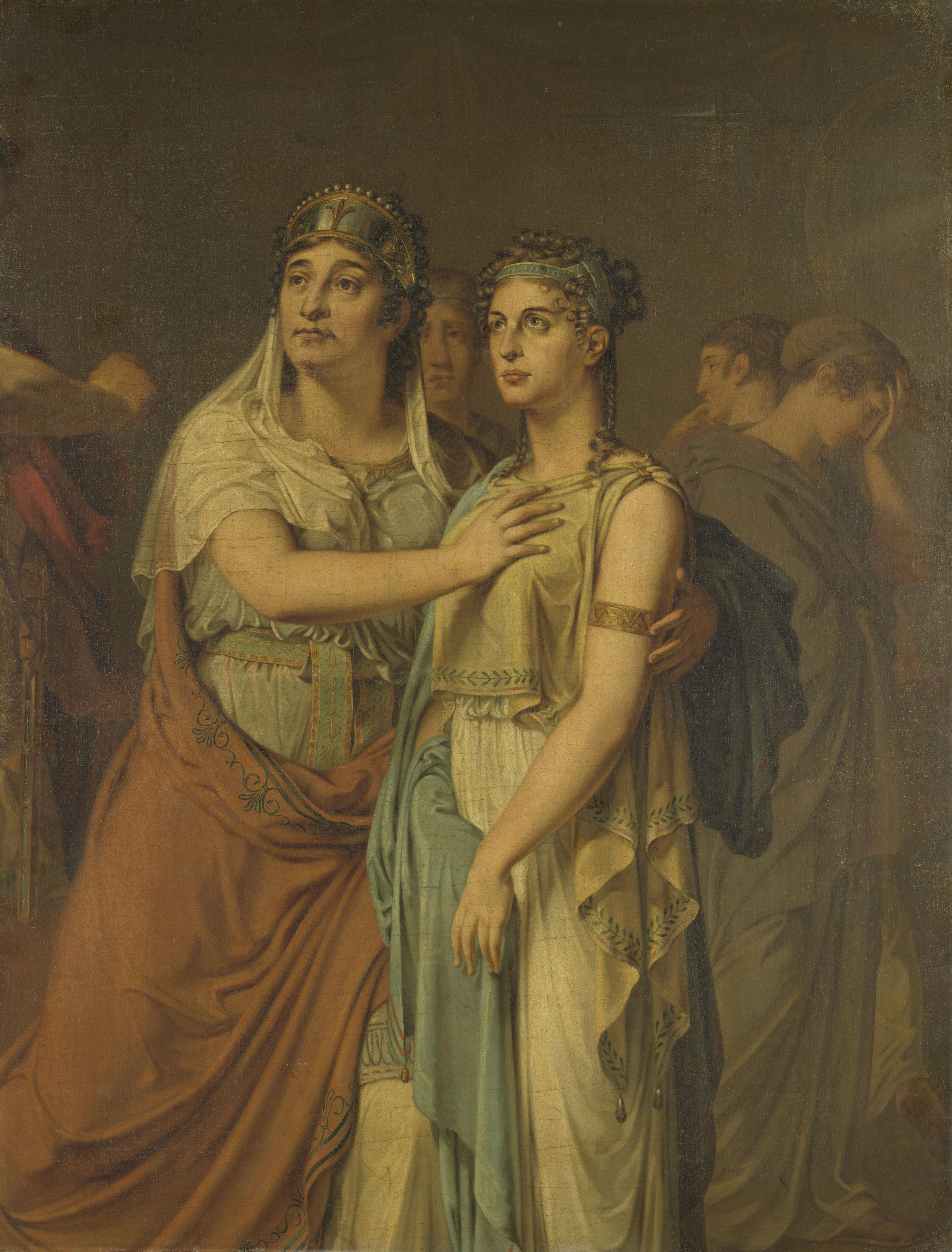 De actrices Joanna Cornelia Ziesenis-Wattier en Geertruida Jacoba Grevelink-Hilverdink in Iphigenia van Jean Racine. oil on canvasmedium QS:P186,Q296955;P186,Q12321255,P518,Q861259. Height: 158.8 cm (62.5 ″); Width: 120.7 cm (47.5 ″) dimensions QS:P2048,158.8U174728;P2049,120.7U174728. Amsterdam, Rijksmueum Amsterdam.